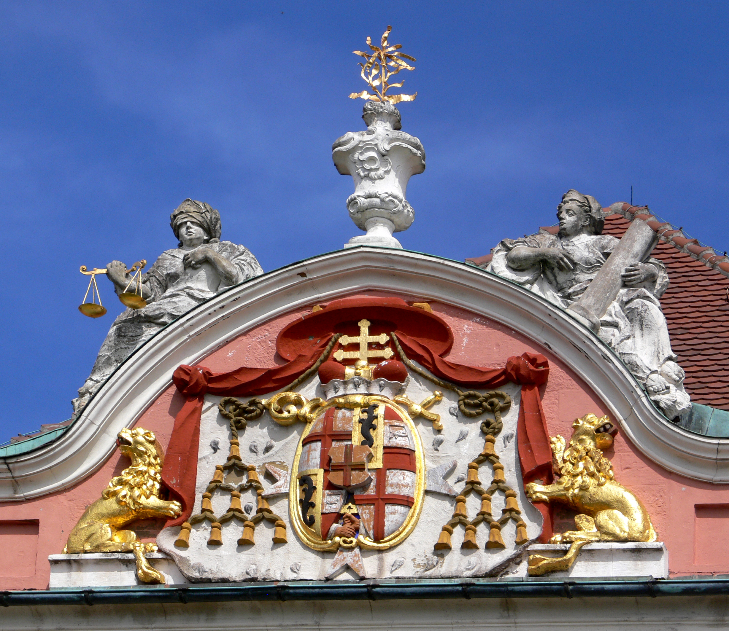 Meersburg, Bodenseekreis Seefassade des Neuen Schlosses, Wappen des Fürstbischofs Franz Konrad von Rodt (vor der Renovierung, mit wenig gelungener Damaszierung)